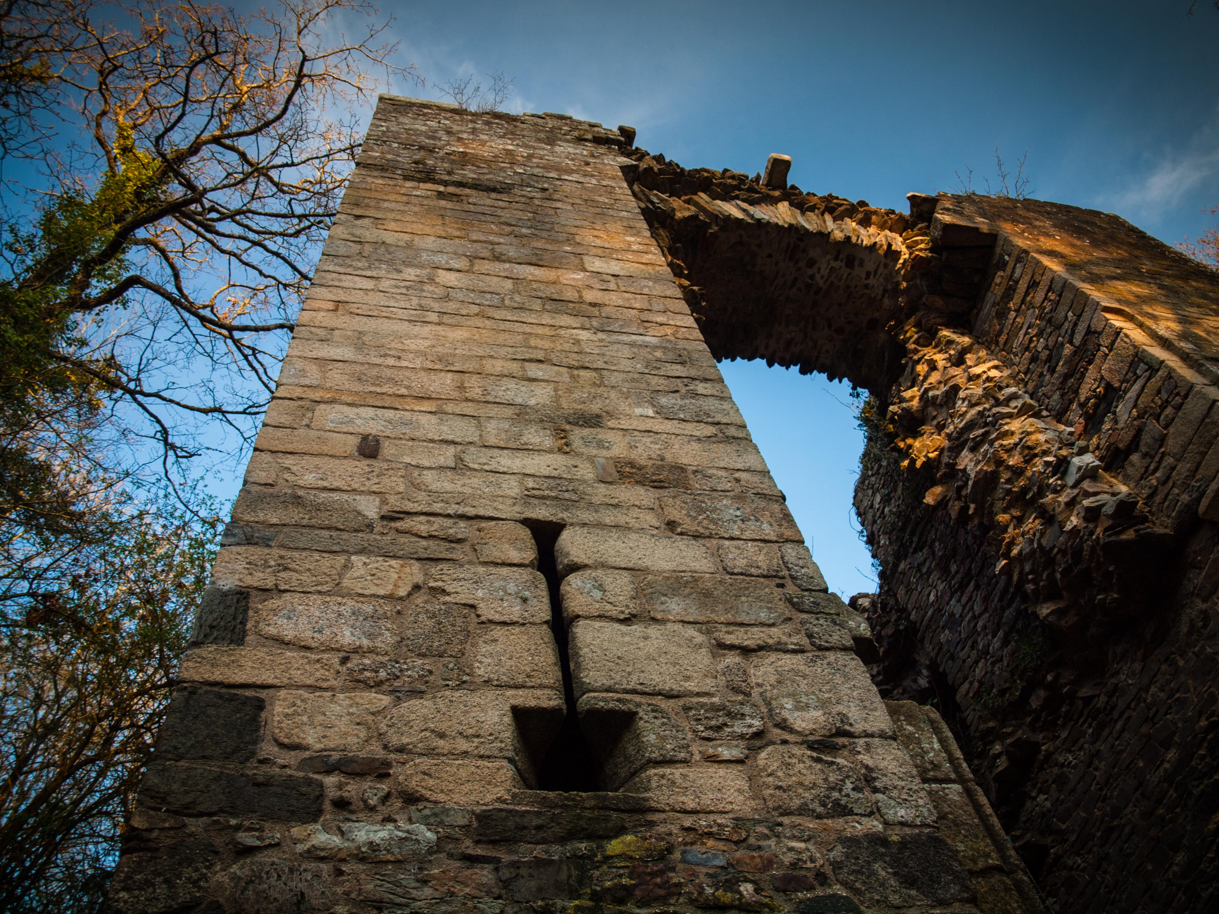 Château de Rieux